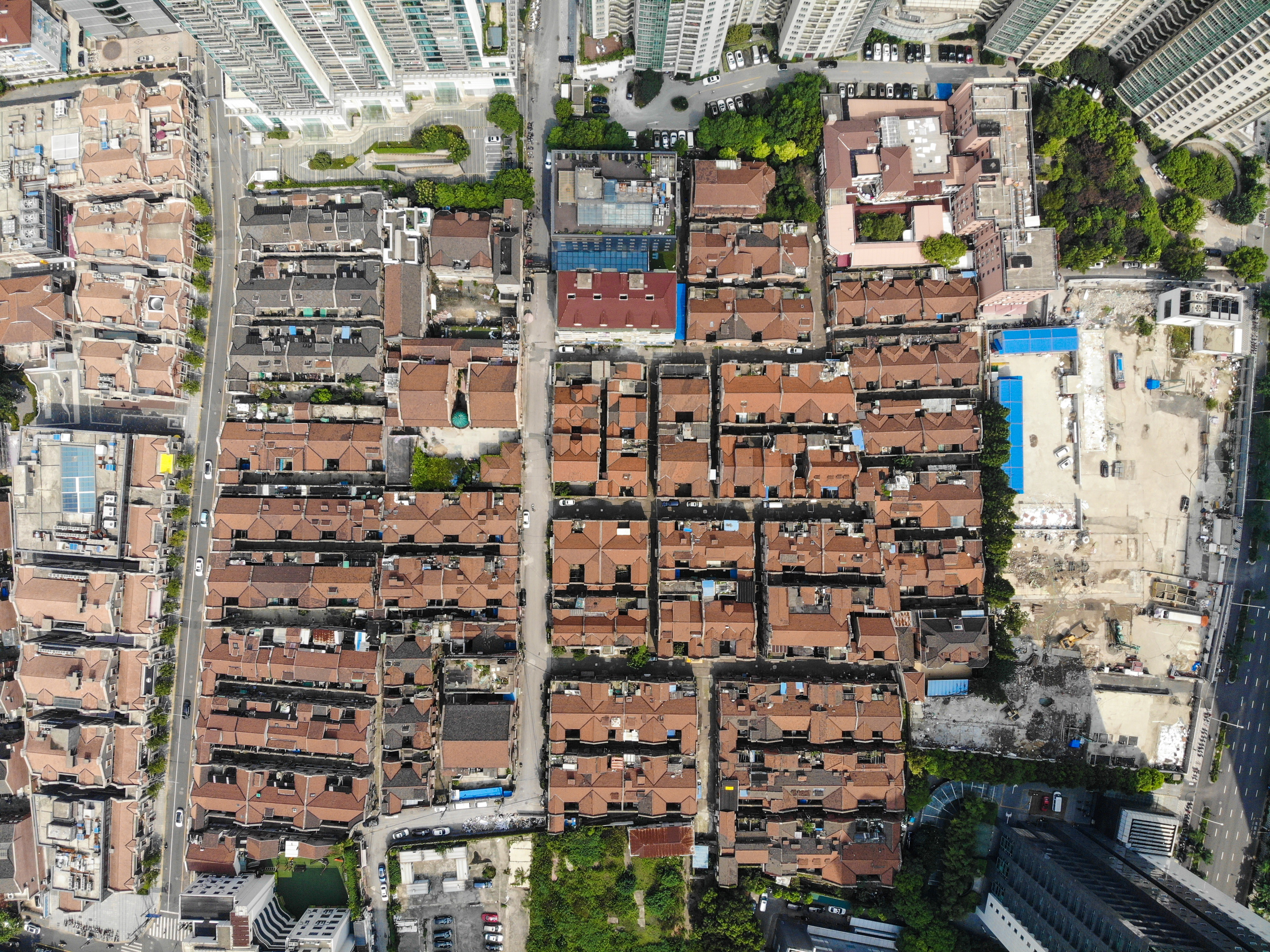 中文（中国大陆）: 静安区文物保护点 张园